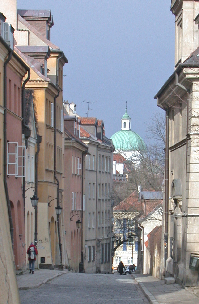 Varsavia, via Brzozowa, da via Celna.